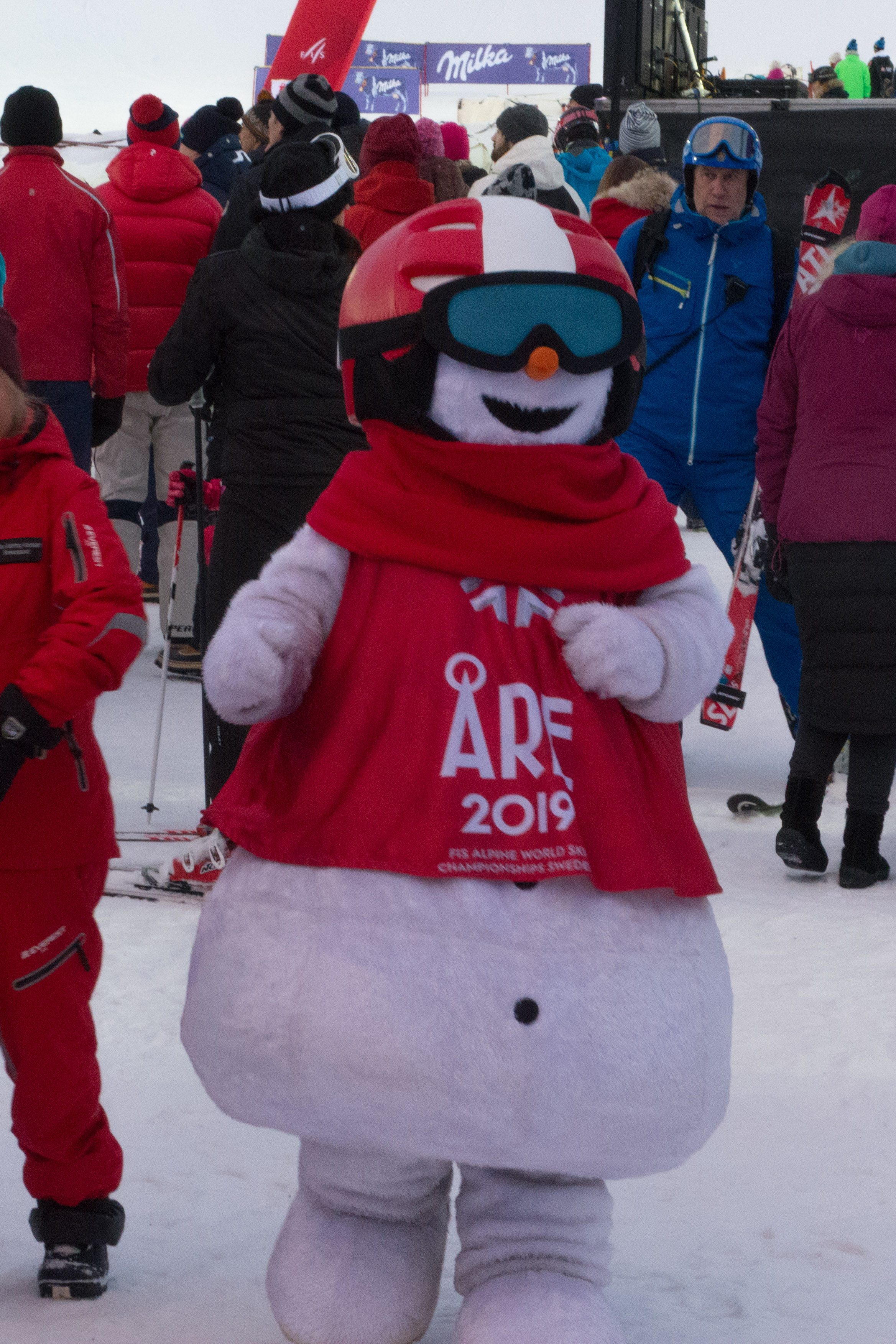 Skistars maskot Valle